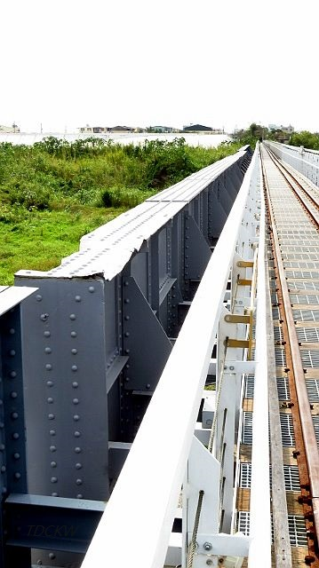 台糖斗南線虎尾溪橋中段 was filmed by TDCKW on 20160214